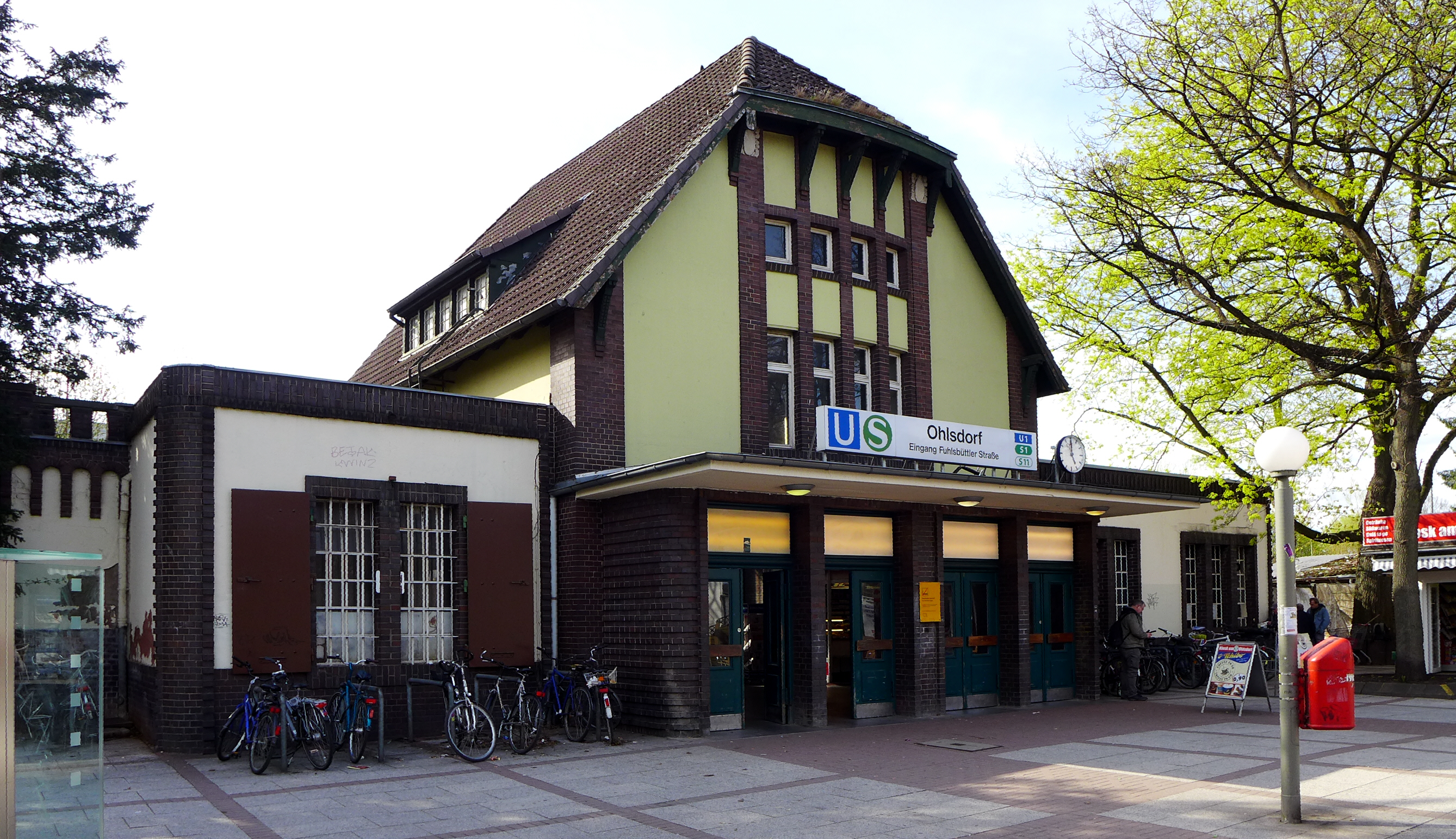 U- und S-Bahnhof Hamburg-Ohlsdorf. Das Bahnhofsgebäude wurde errichtet nach einem Entwurf des Hamburger Architekten Henry Grell (1870-1937). Inbetriebnahme des Empfangsgebäudes in 1906.